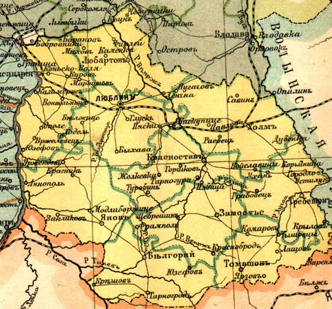 Gubernia lubelska w 1896 r.